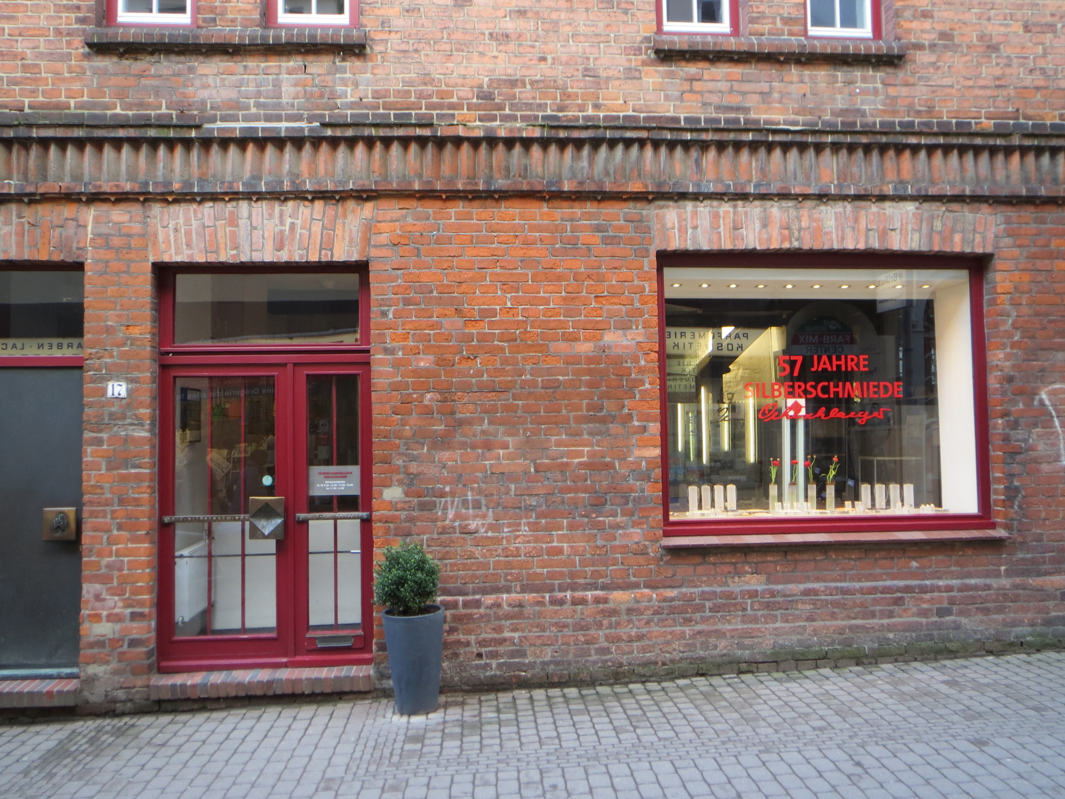 Pfaffenstraße 17: Silberschmiede Oehlschlaeger